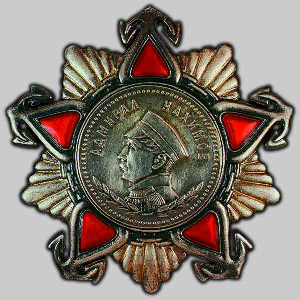 Орден Нахимова второй степени